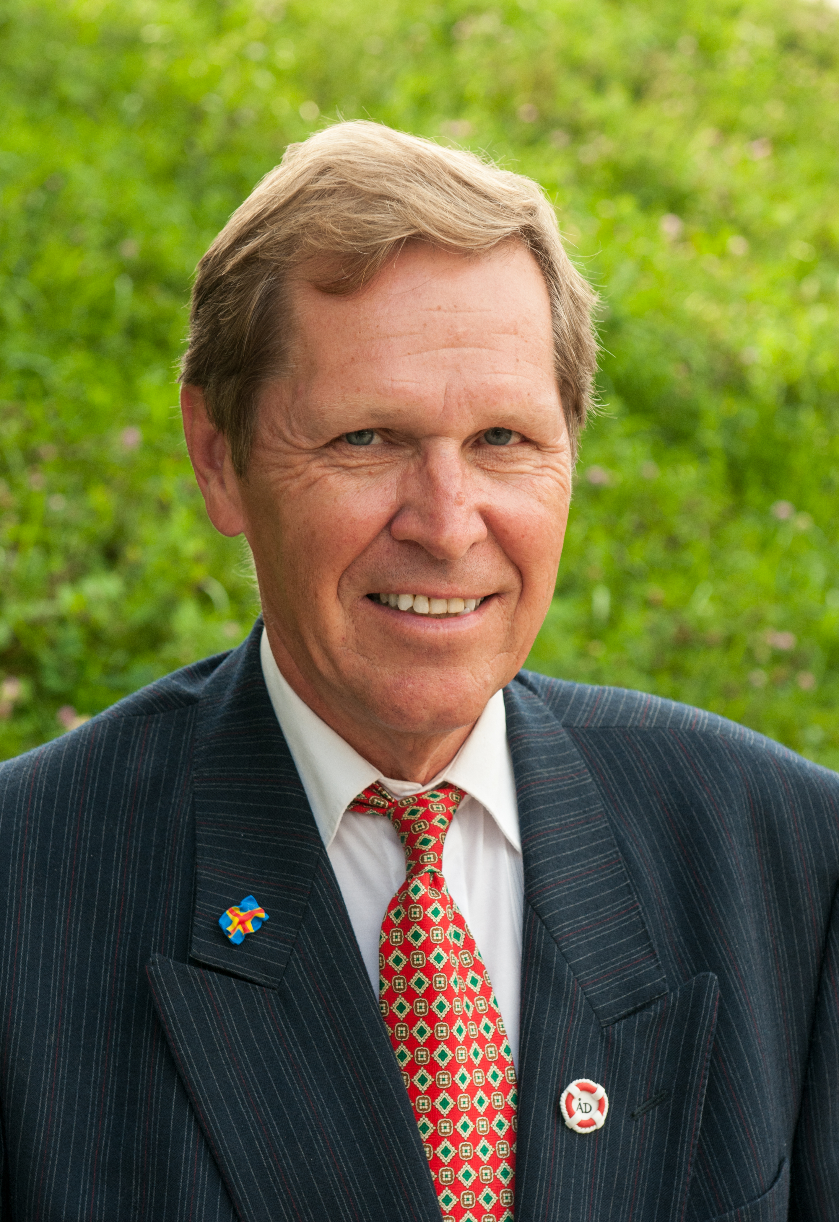 Stephan Toivonen, Tagtingsledamot, Ålands Lagting